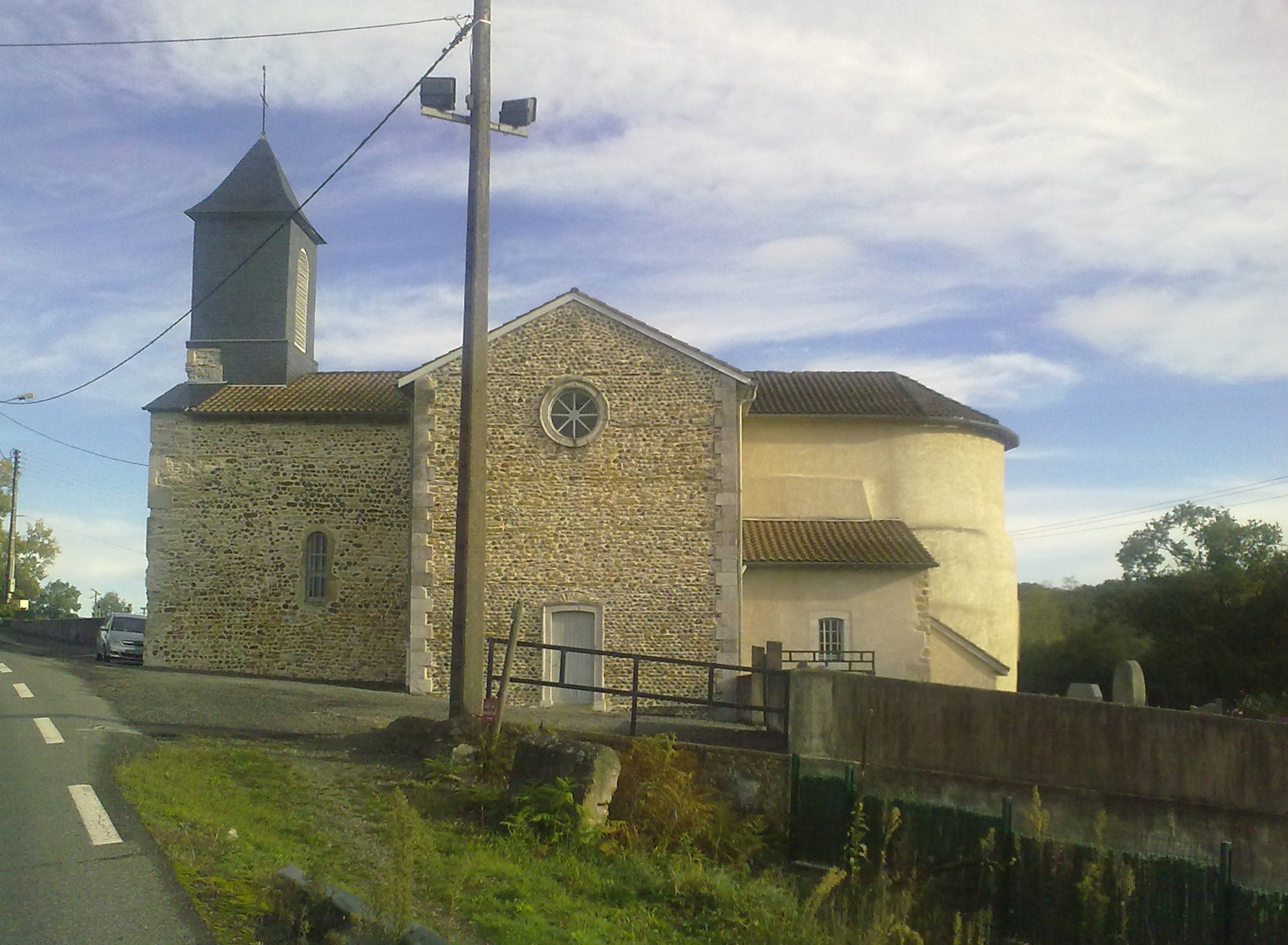 Église de Argagnon